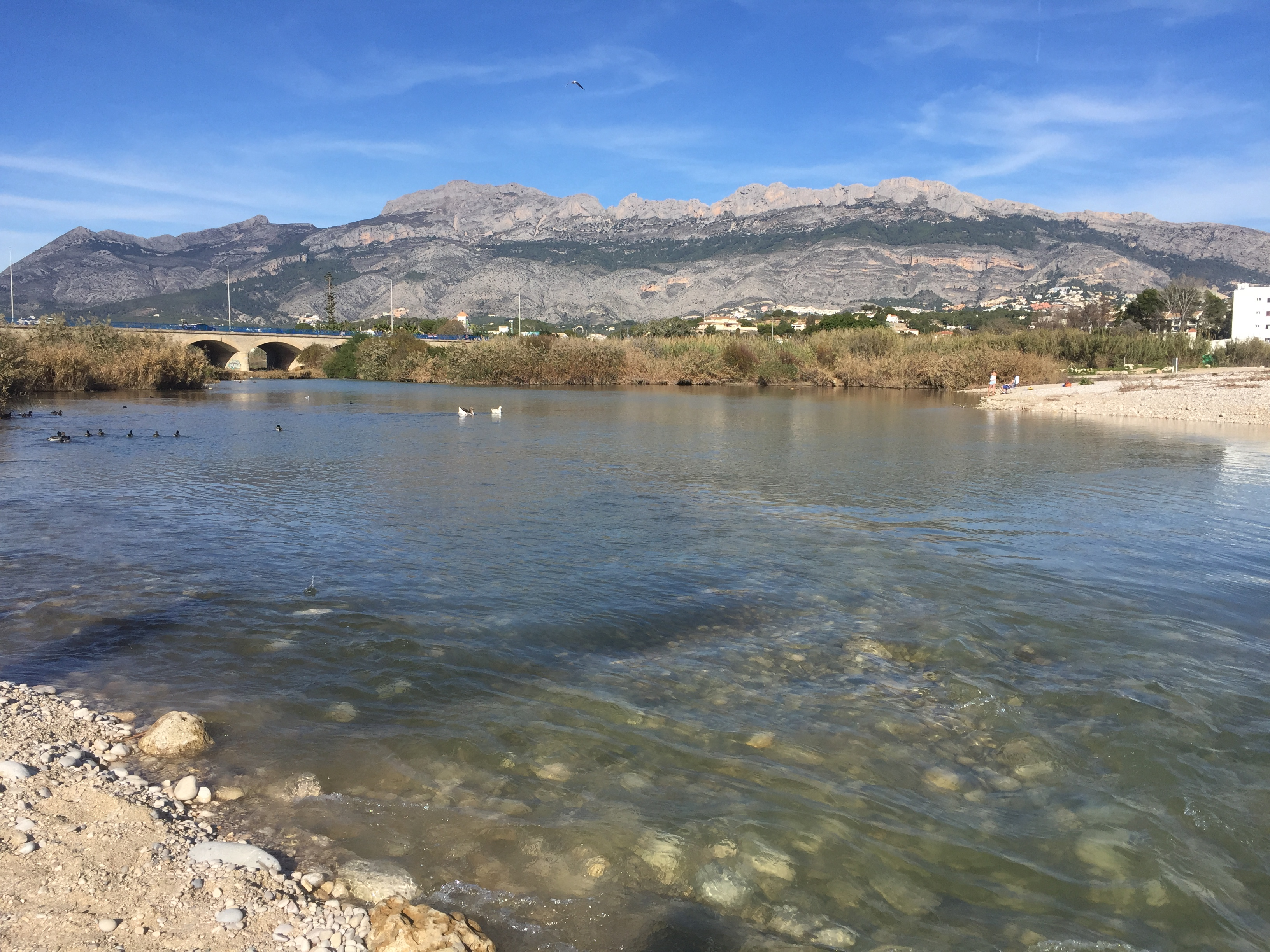 Río Algar desembocadura en Altea